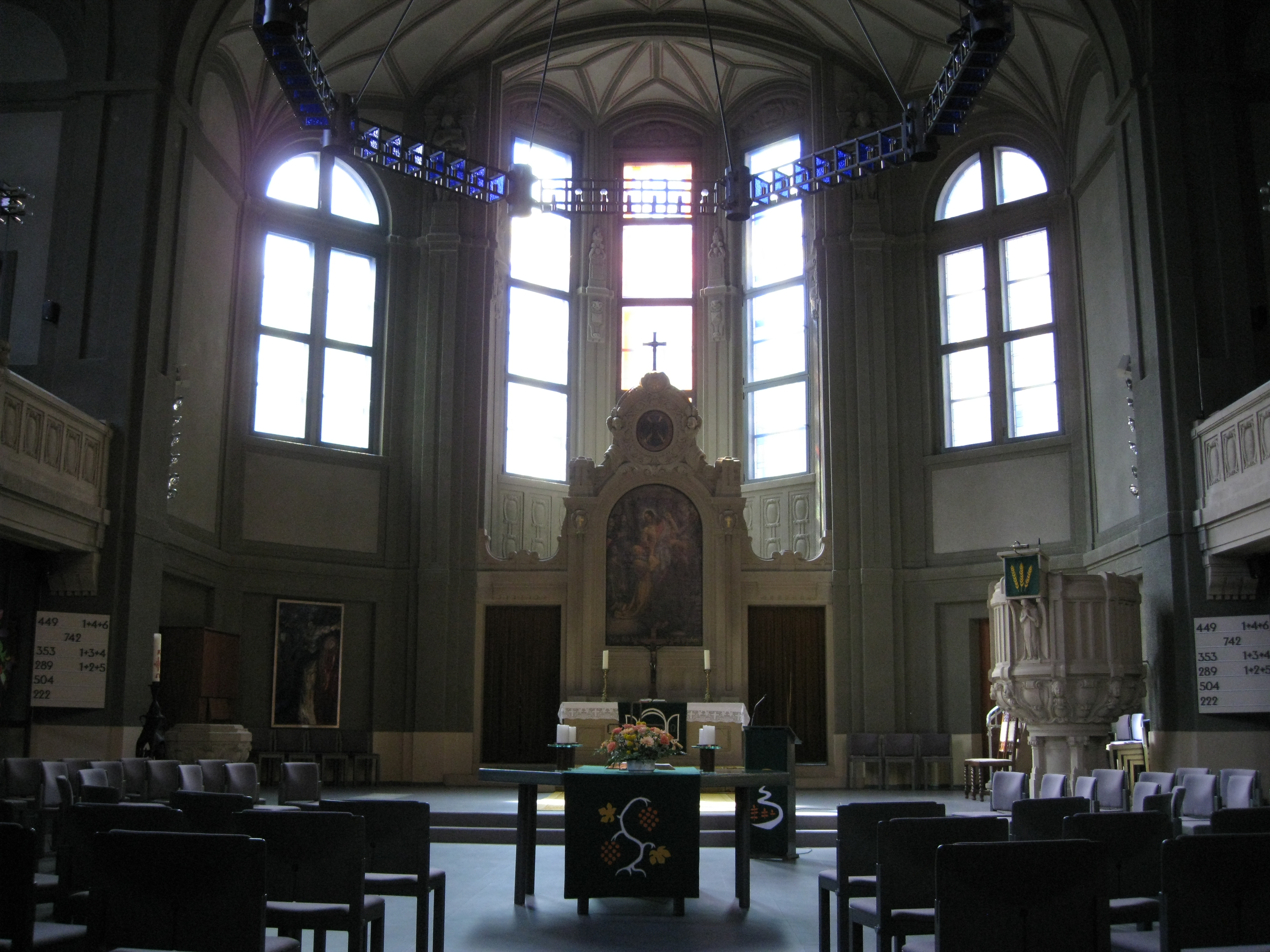 Altar der Philipp-Melanchthon-Kirche